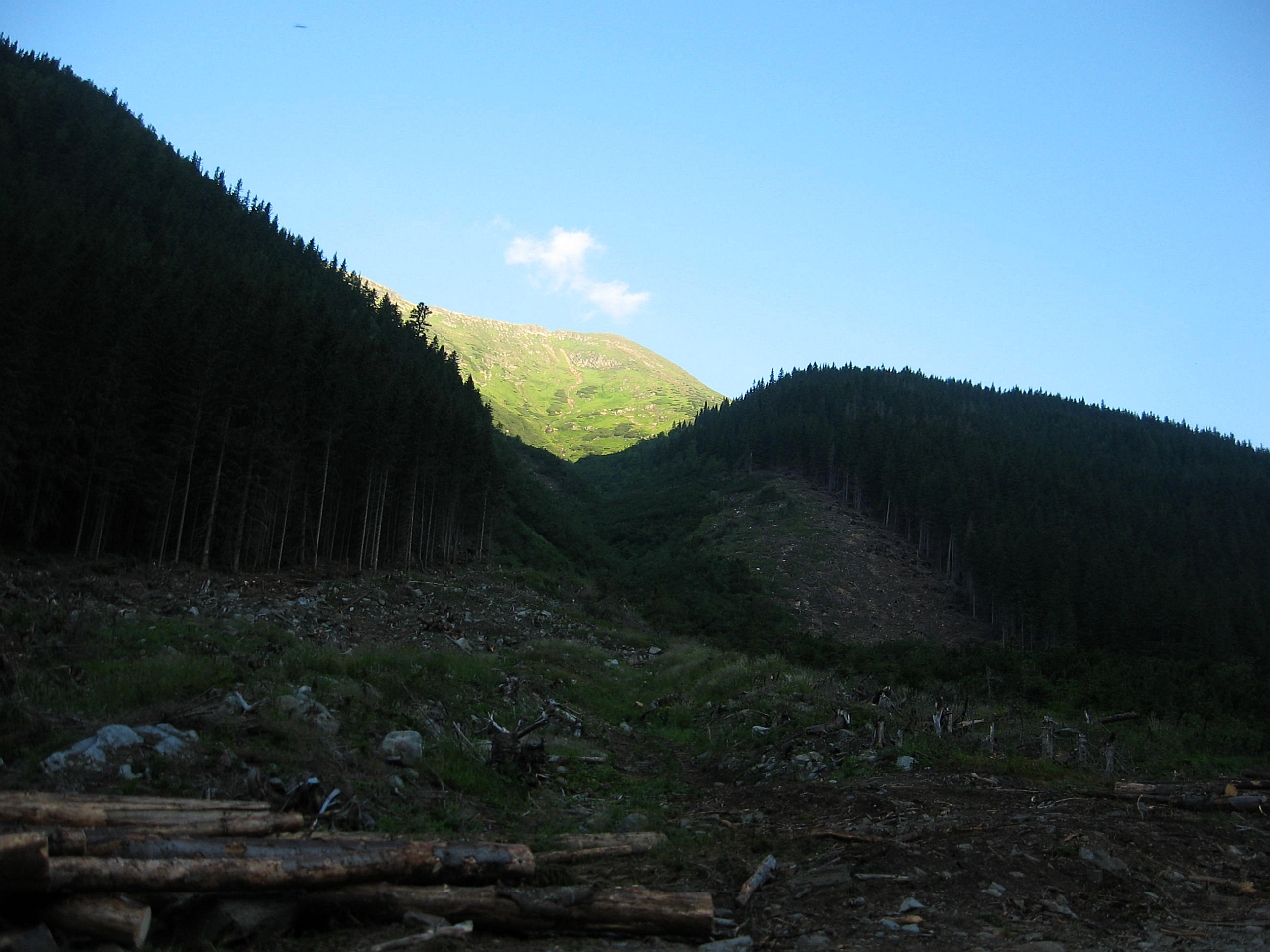 Wylot Masłowego Żlebu w dolinie Jamnickiej w Tatrach